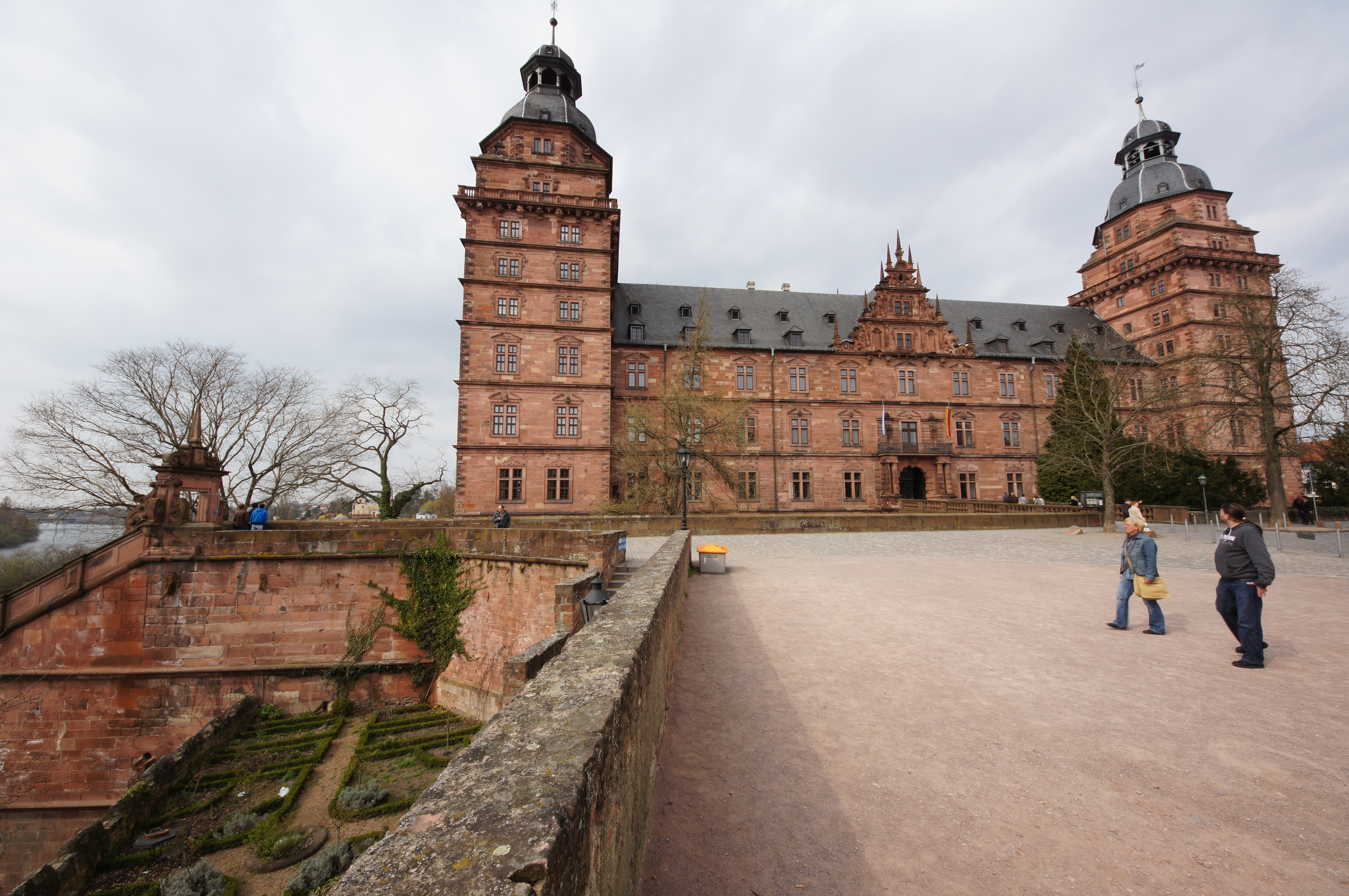 2011-03-26 Aschaffenburg 002 Schloss Johannisburg